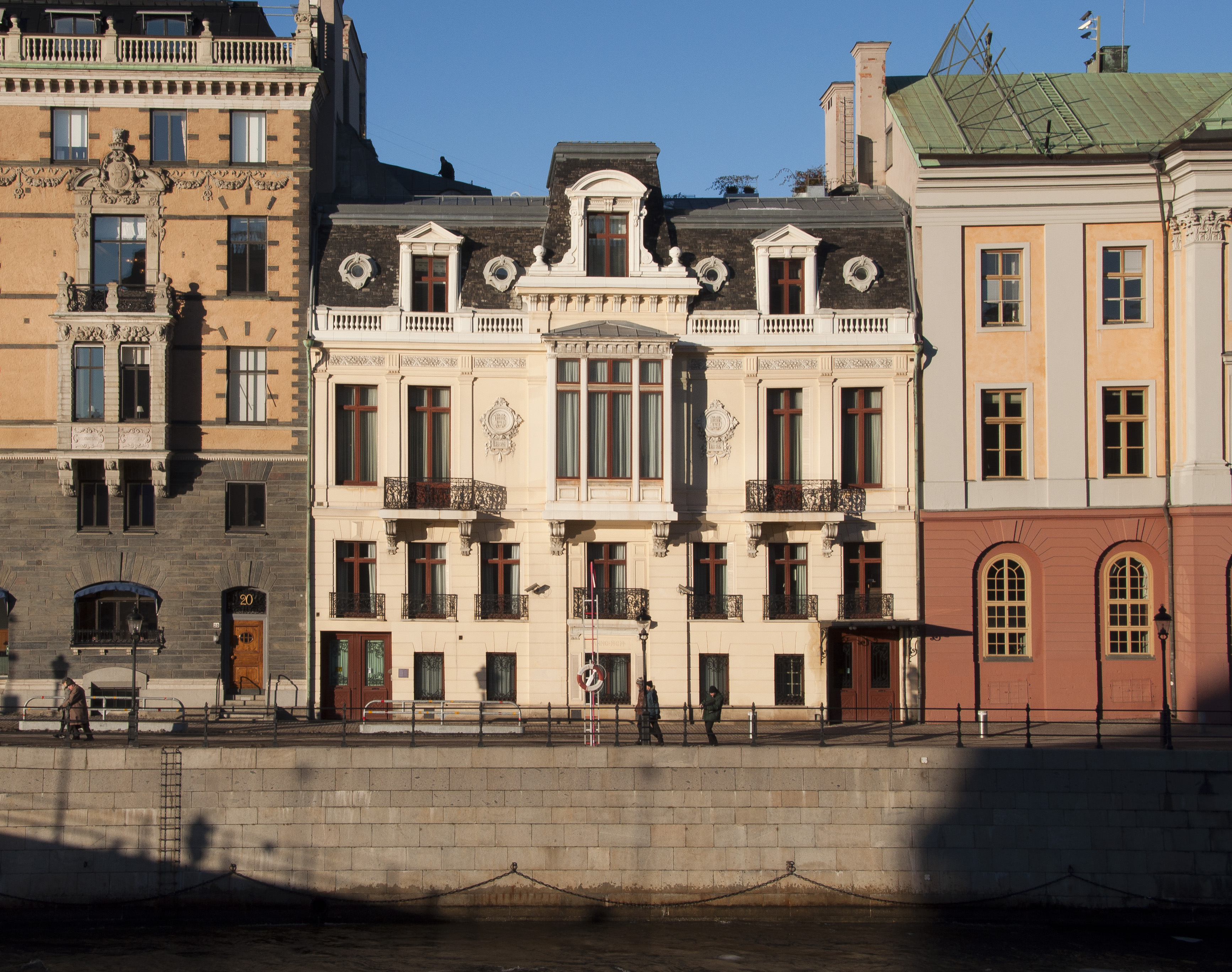 Sagerska palatset